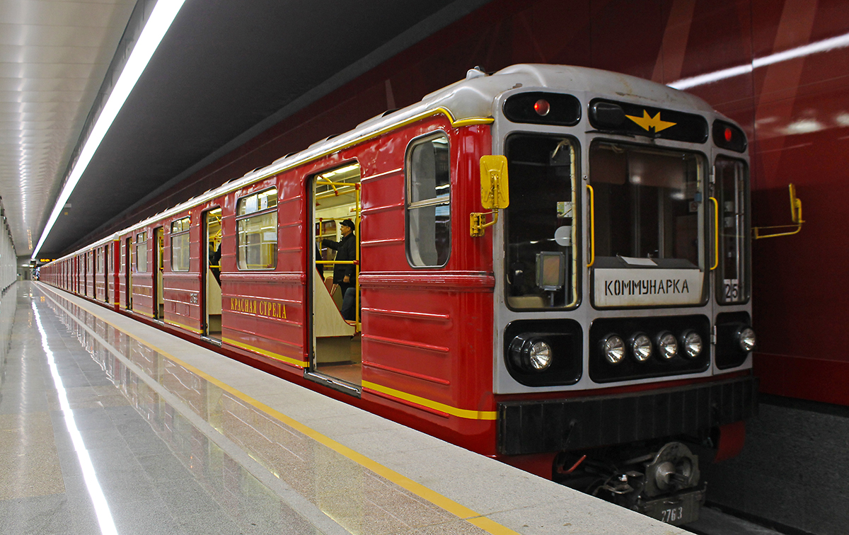 Оформление бортов вагонов